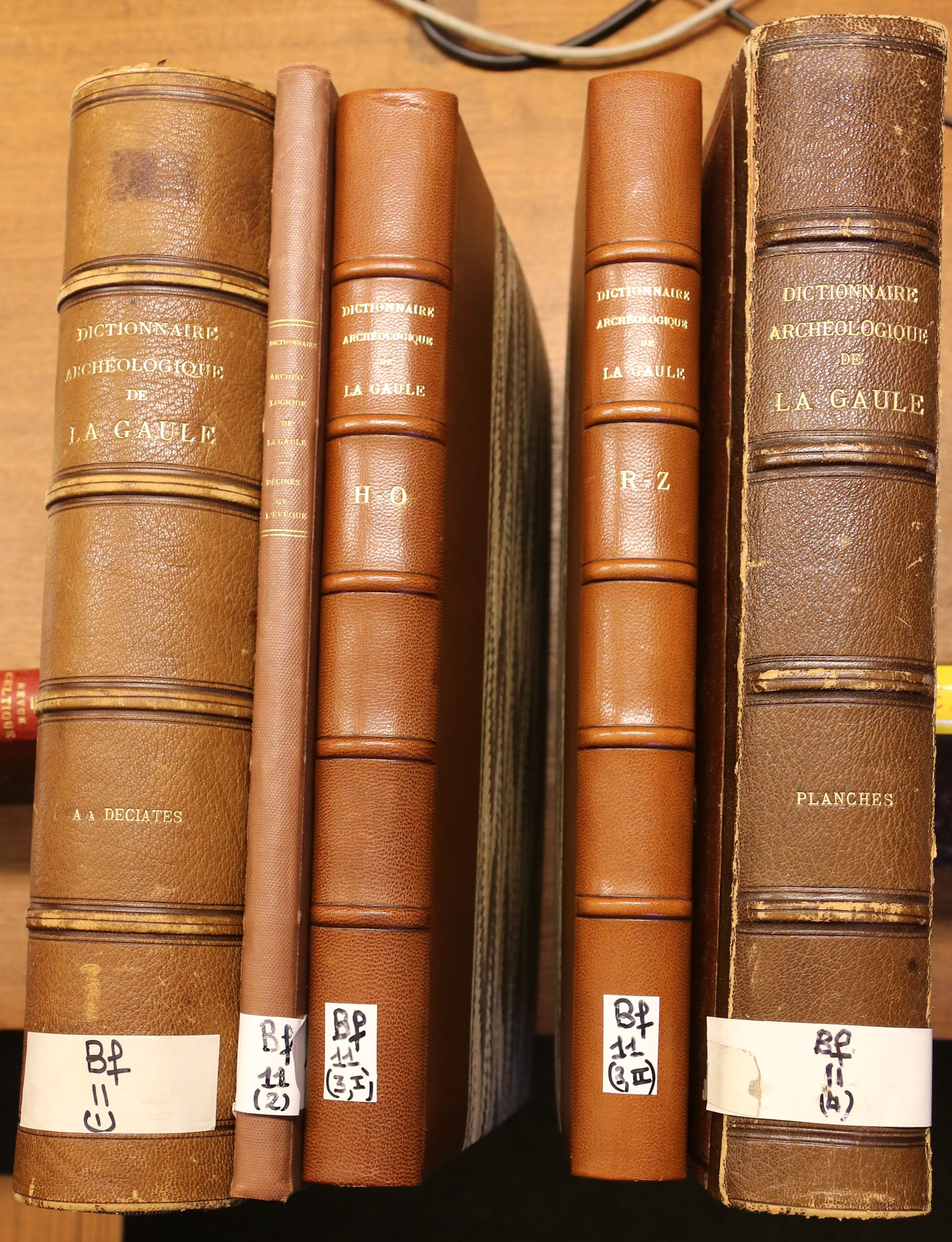 Dictionnaire archéologique de la Gaule, en 4 volumes + planches, publié par la commission instituée au ministère de l'Instruction publique et des Beaux-Arts, 1875. Exemplaire du Musée nationale d'Archéologie